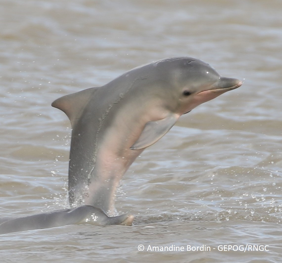 Saut d'un jeune